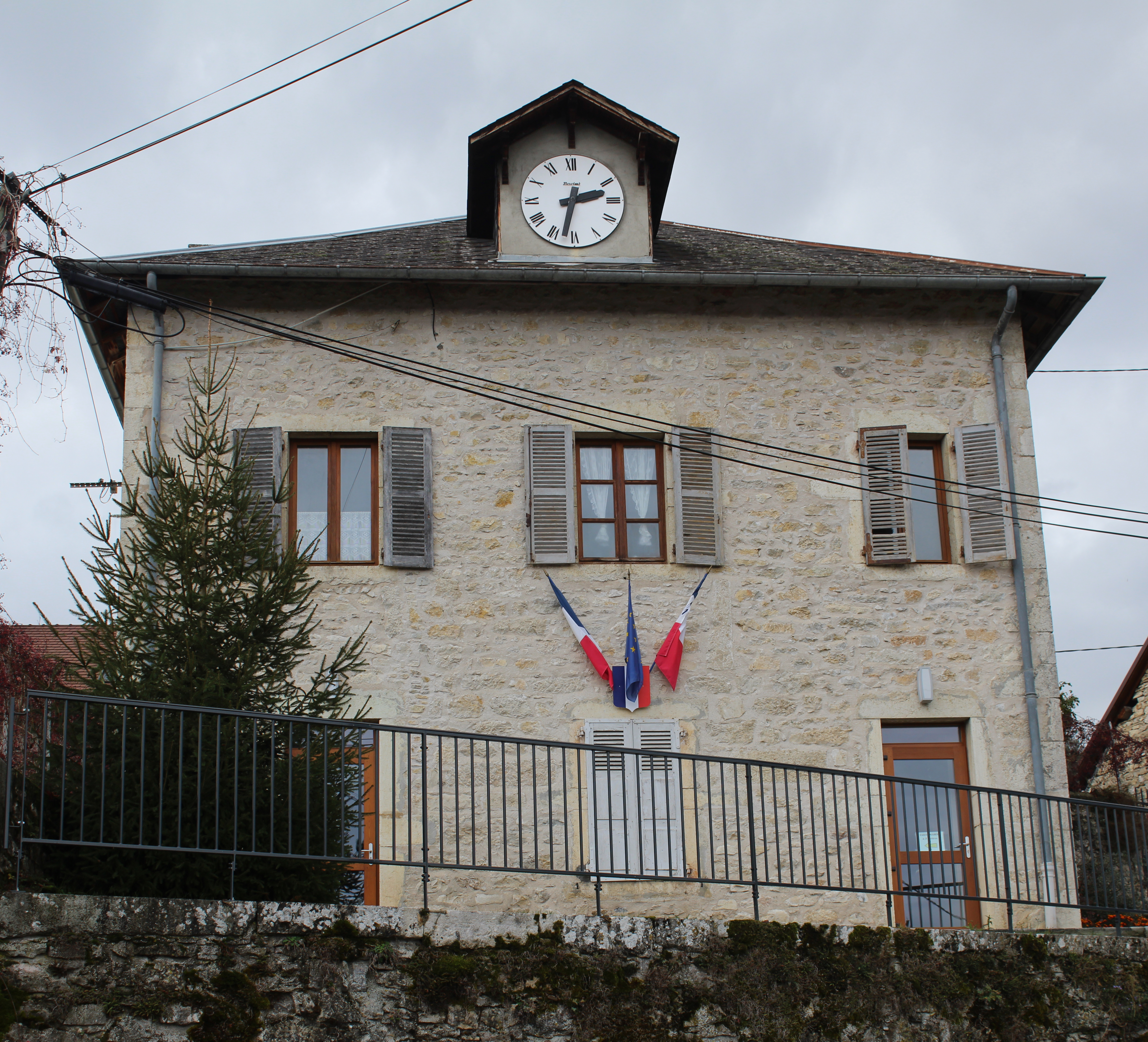 Mairie de Colomieu.